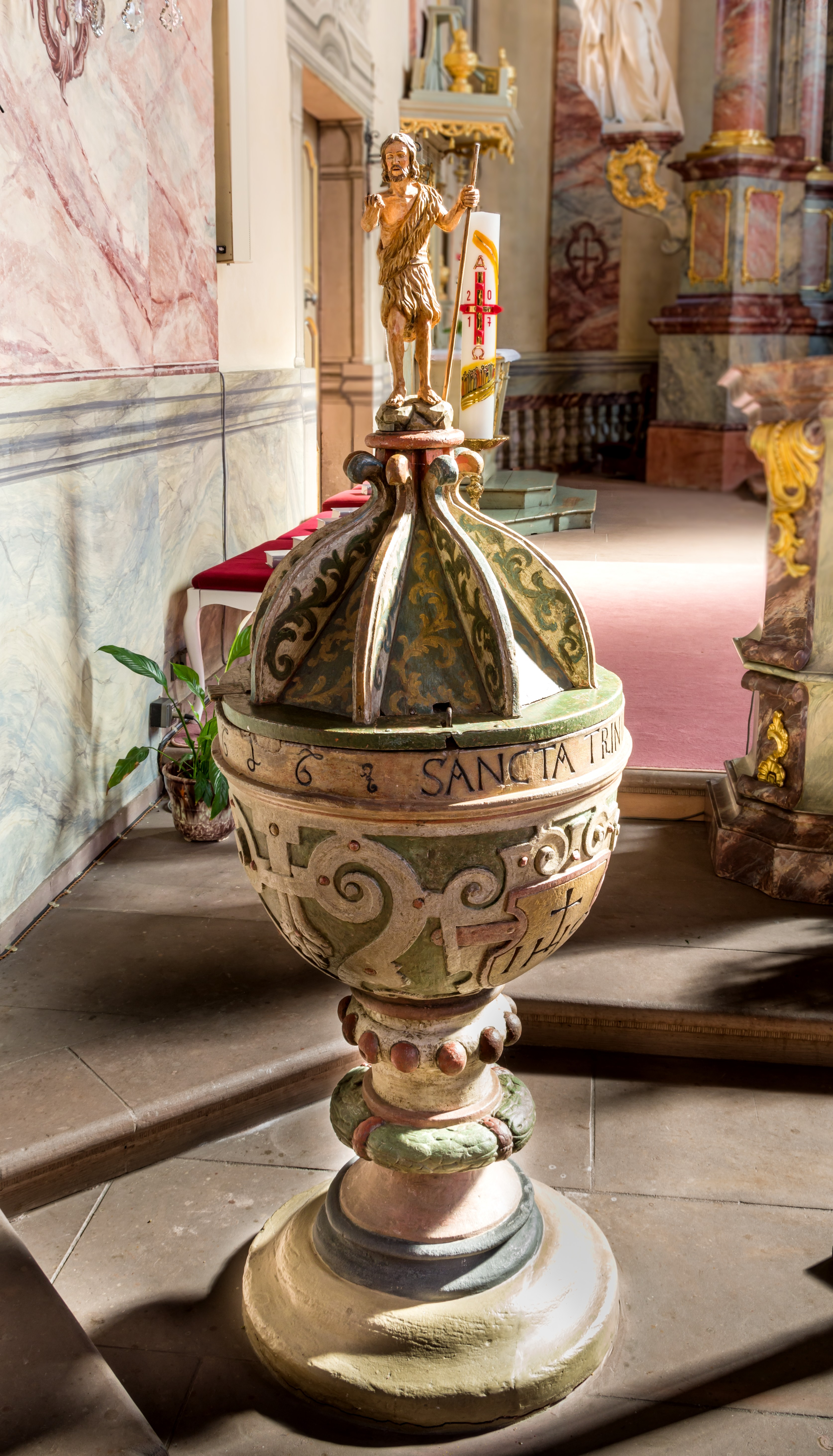 St. Brigitta Niederschopfheim, Hohberg